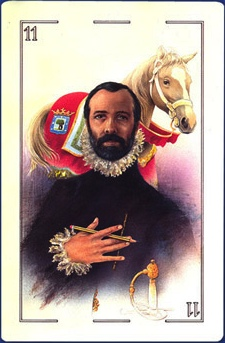 Jose Maria Ponce Saiz